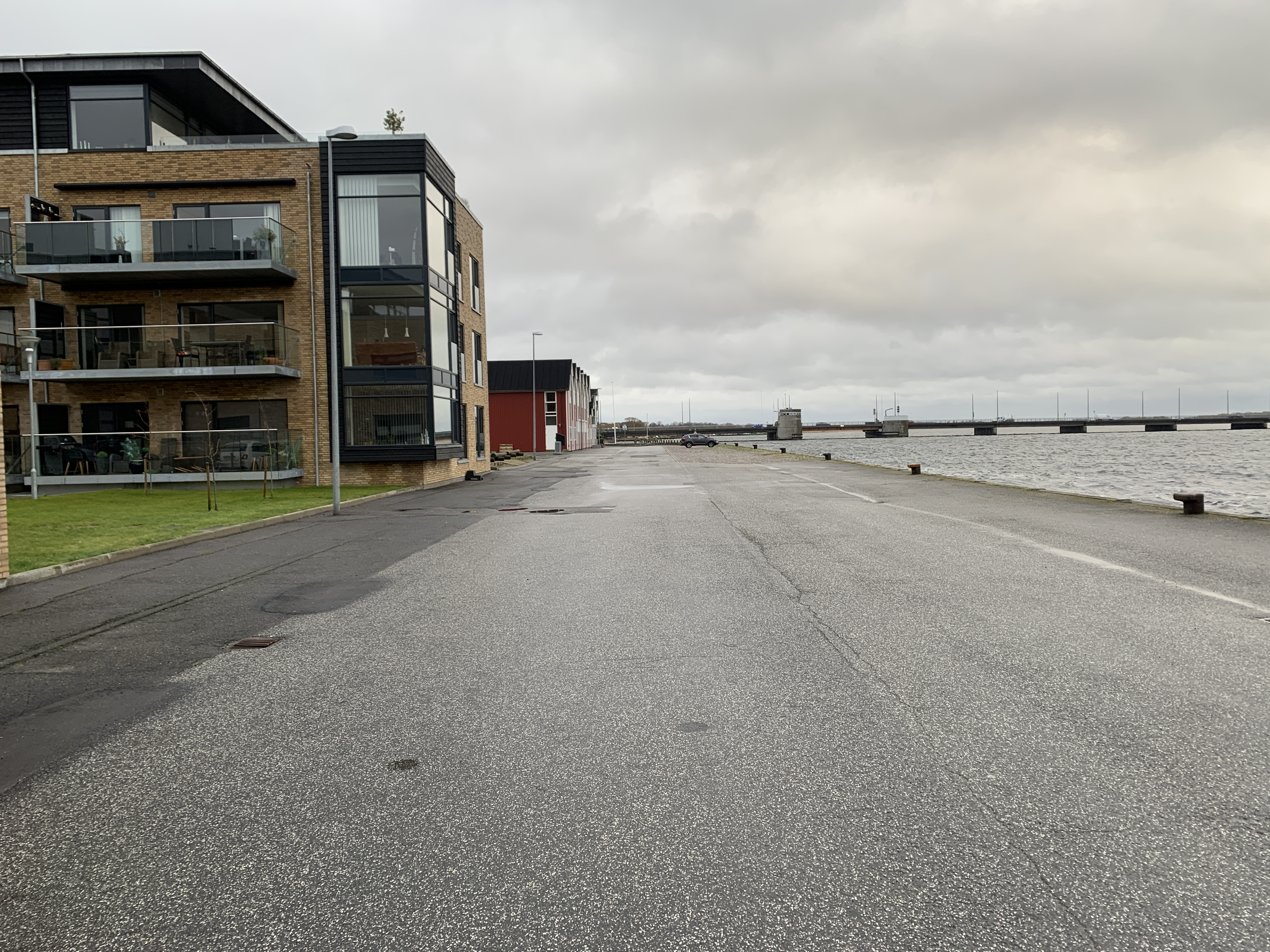 Hadsund Trafikhavne set mod øst og Hadsundbroen. i venstre side kan man se at der er en meget mærkelig rævne i asfalten den er det ene spor fra havnebanen som ligger unden asfalten, også i højre side kan man se en rævne i astfandten det kan være det andet spor fra havnebanen.